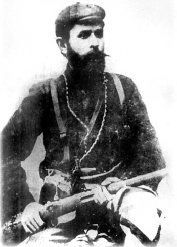 Никола Карев във въстаническа униформа.